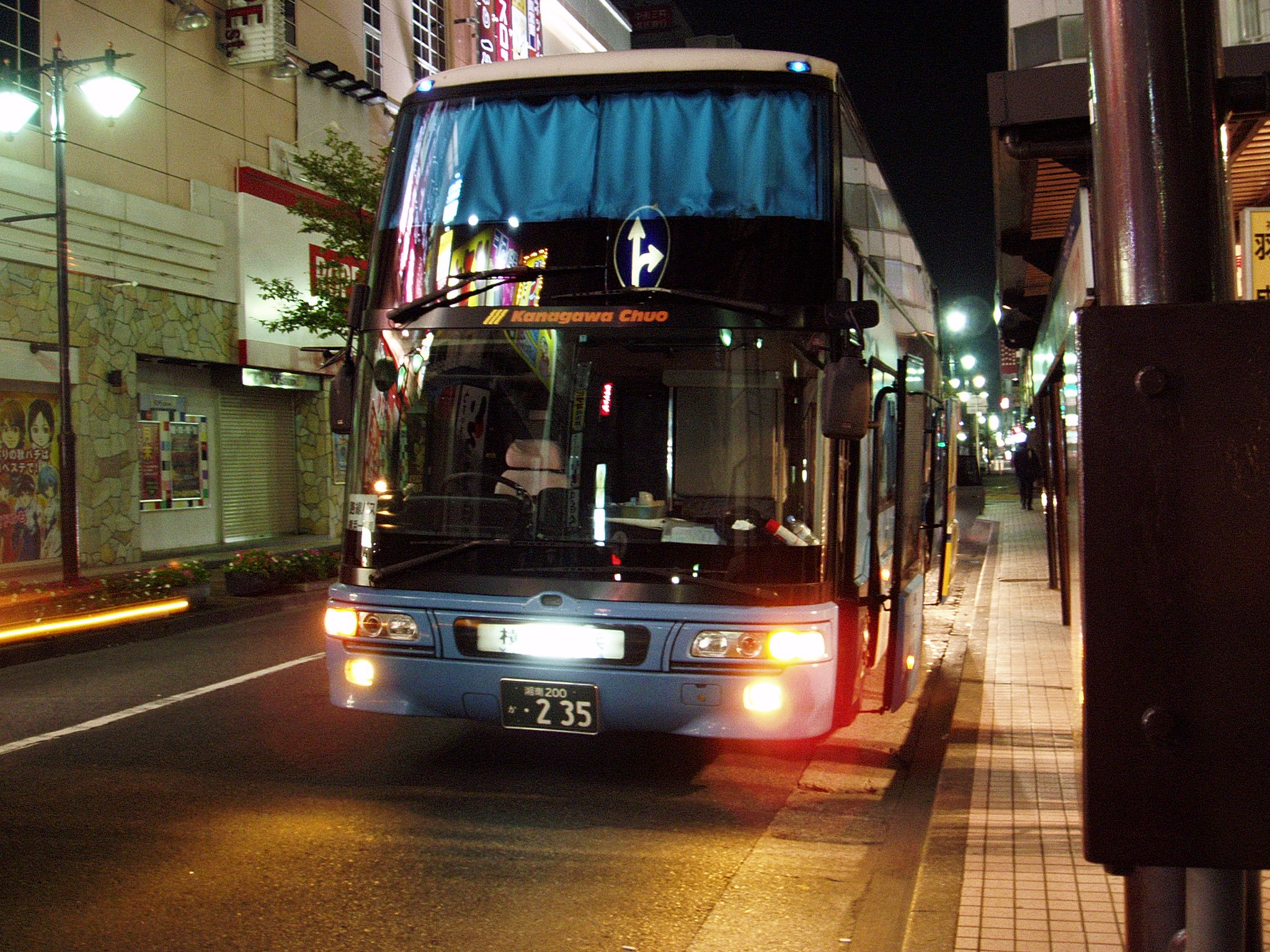 Shonan Kanako Ka701（か701） mitsubishi KC-MU612TA at hon-atsugi Sta.